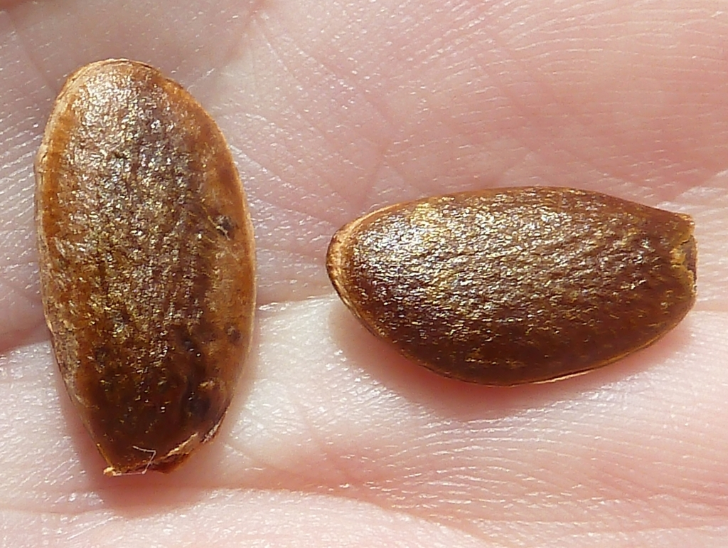 Diospyros kaki cv. Persimon (Caqui Persimon) : Simientes sueltas - Comercio, Madrid (España); procedencia desconocida.